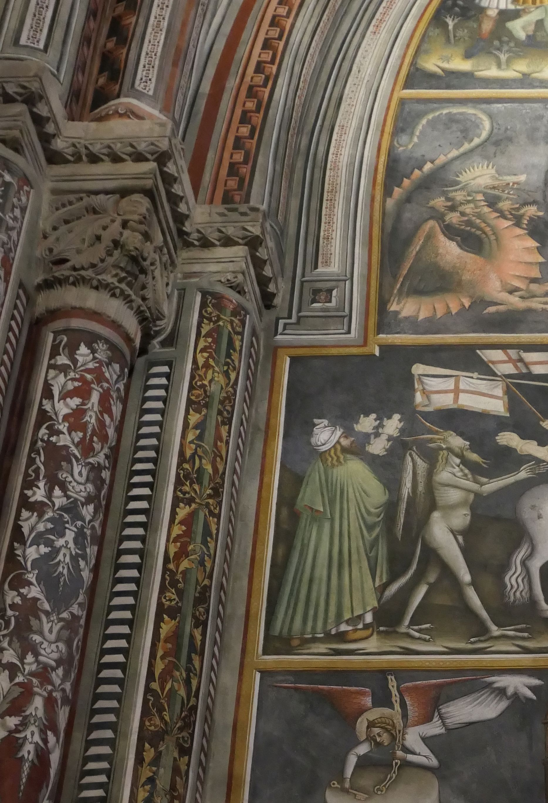 Santa Caterina d'Alessandria (Galatina) Blattmaske Kapitell (Green Man)